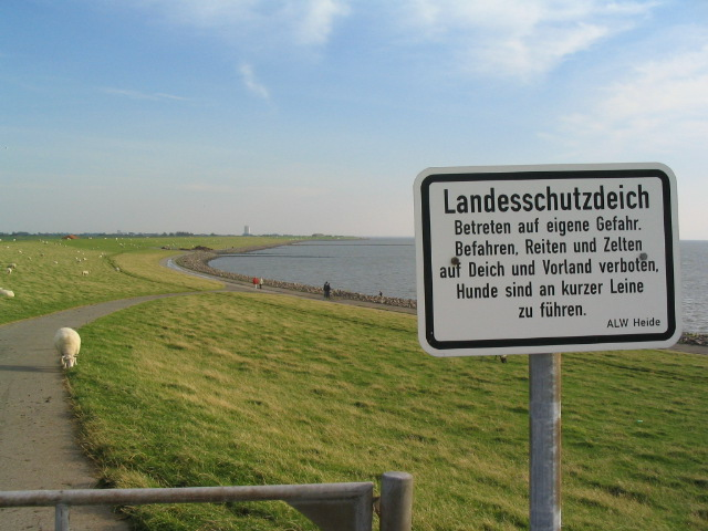 Deich bei Büsum, im Hintergrund das Büsumer Hochhaus.